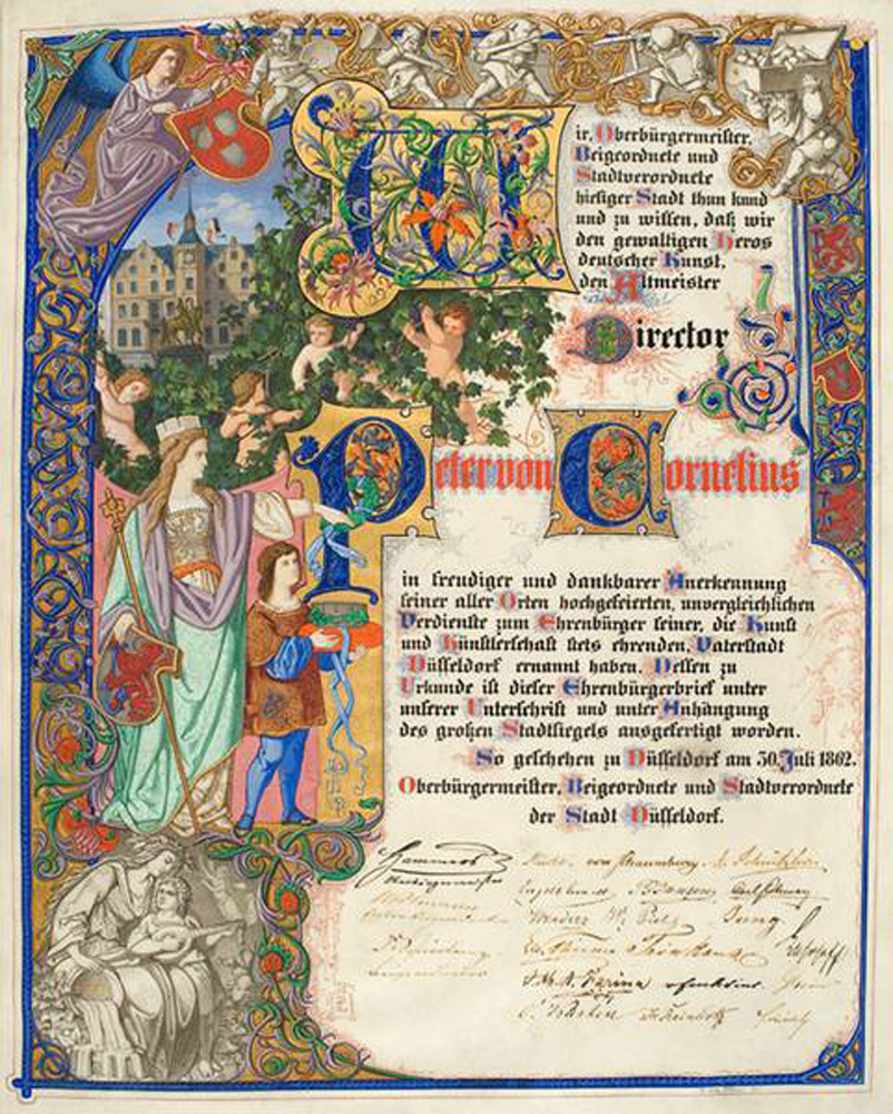 Urkunde Ehrenbürgerbrief der Stadt Düsseldorf vom 30. Juli 1862 an Peter von Cornelius